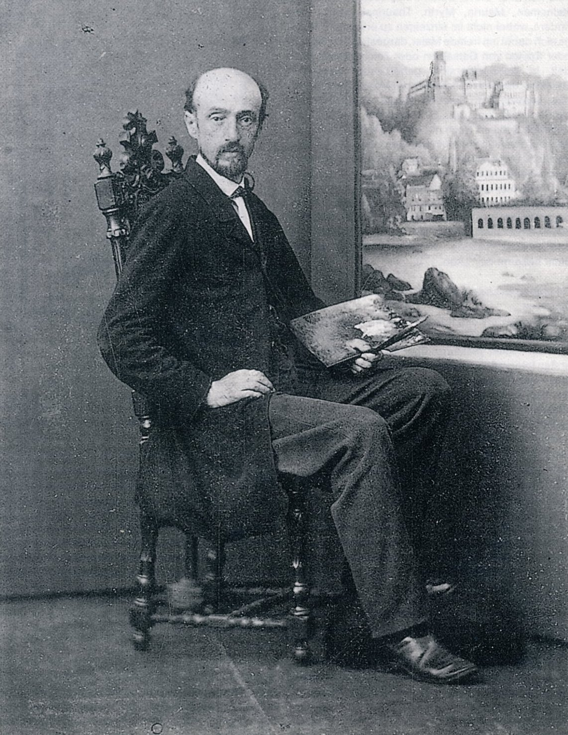 Carte de Visite: Fotografisches Selbstporträt des Malers und Fotografen Lambert Sachs (1818-1903) im Heidelberger Atelier. 10,1 x 6,2 cm. Rückseite: Eduard Schultze, 79, Ploeck-Strasse 79, Heidelberg